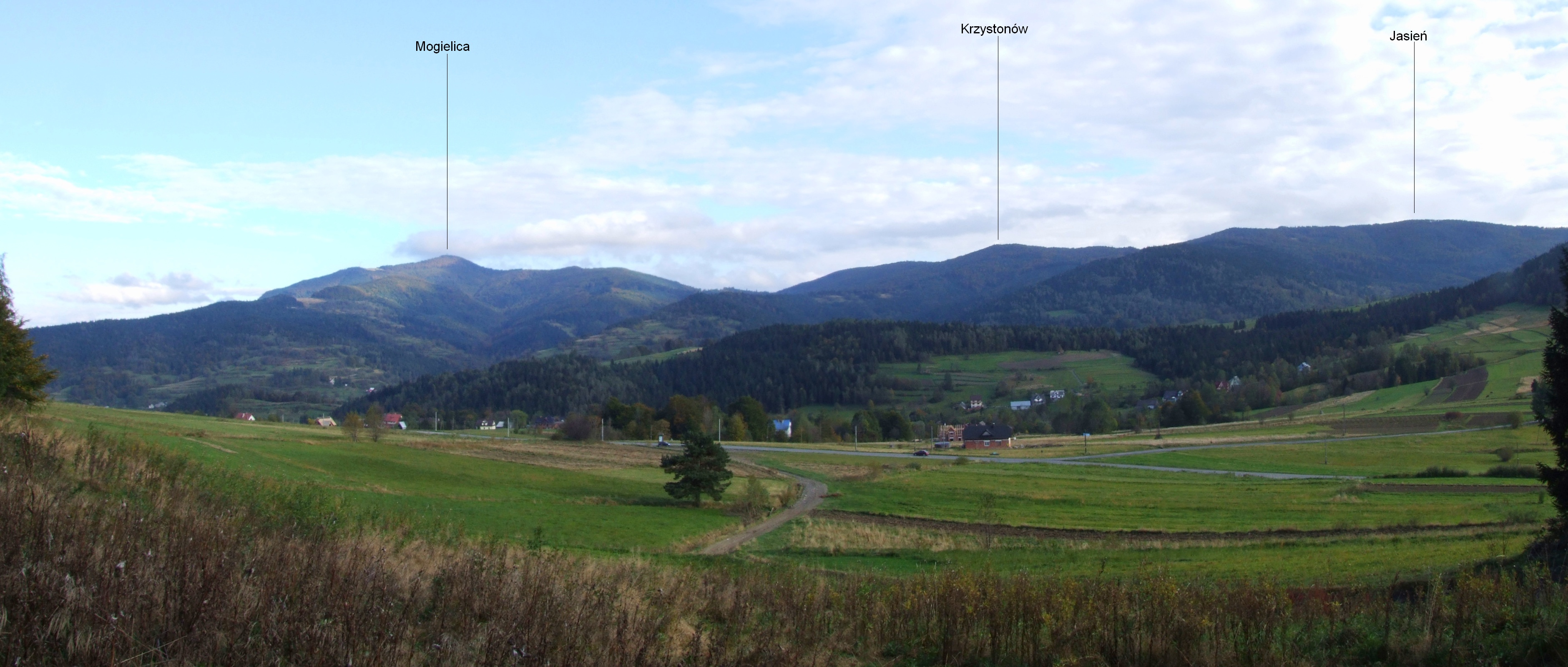 Widok z podnóży Ćwilina w Wilczycach